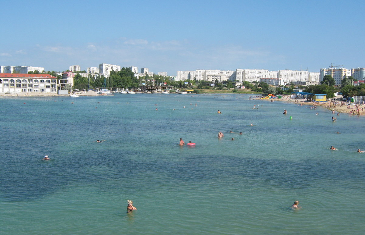 Кругла бухта